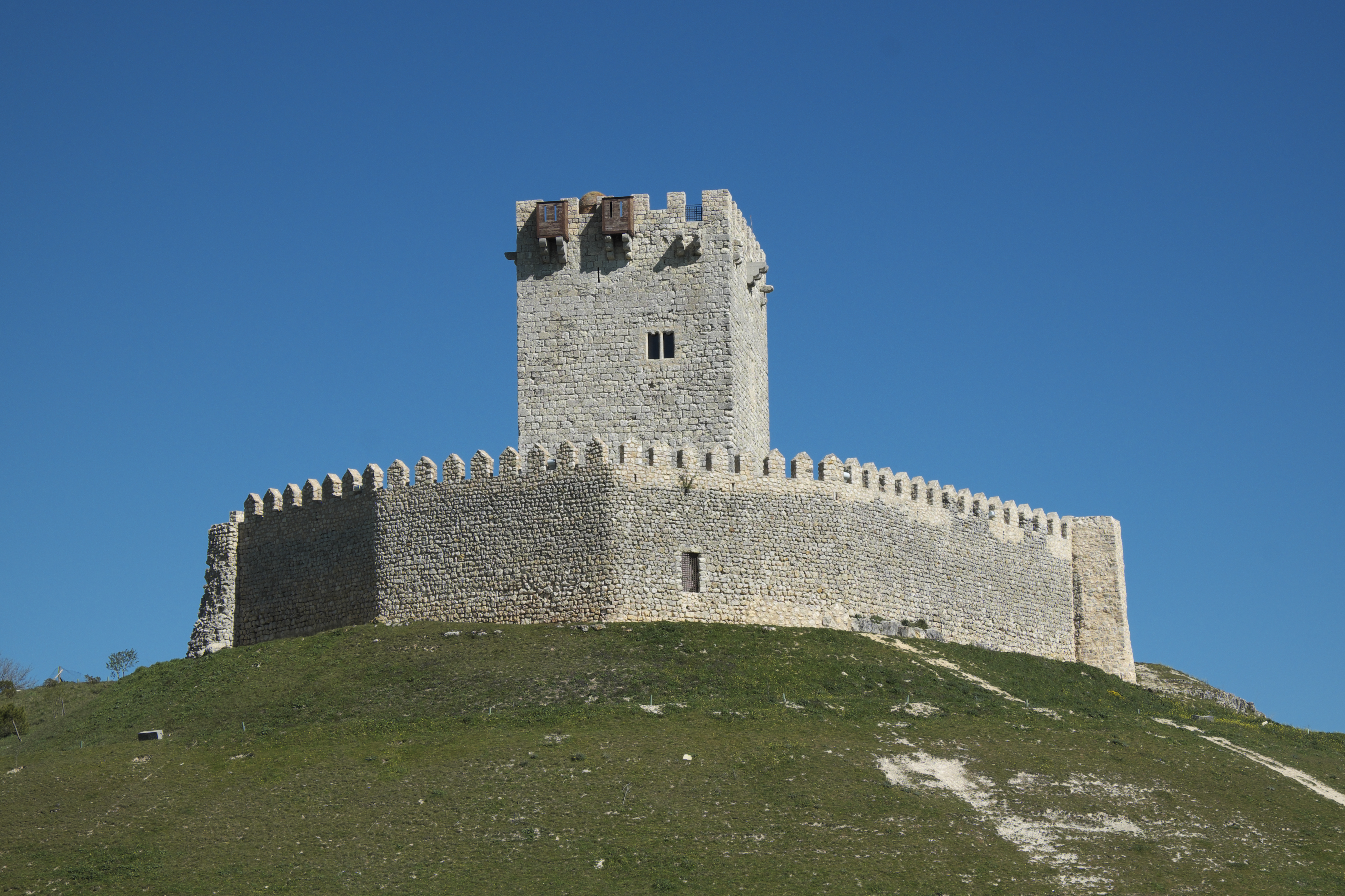 Burgruine, Castillo de Tiedra, in Tiedra in der Provinz Valladolid (Kastilien-León/Spanien)